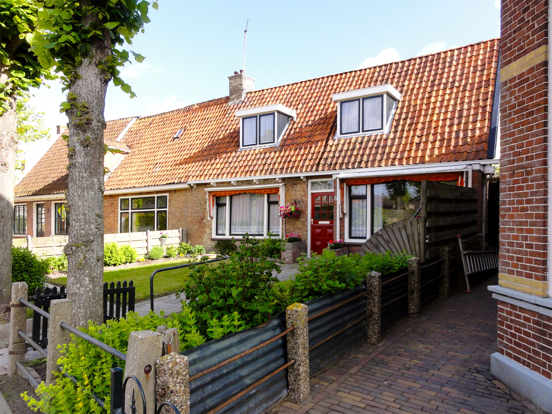 Farrewei 1, 3, en 5 in Blija